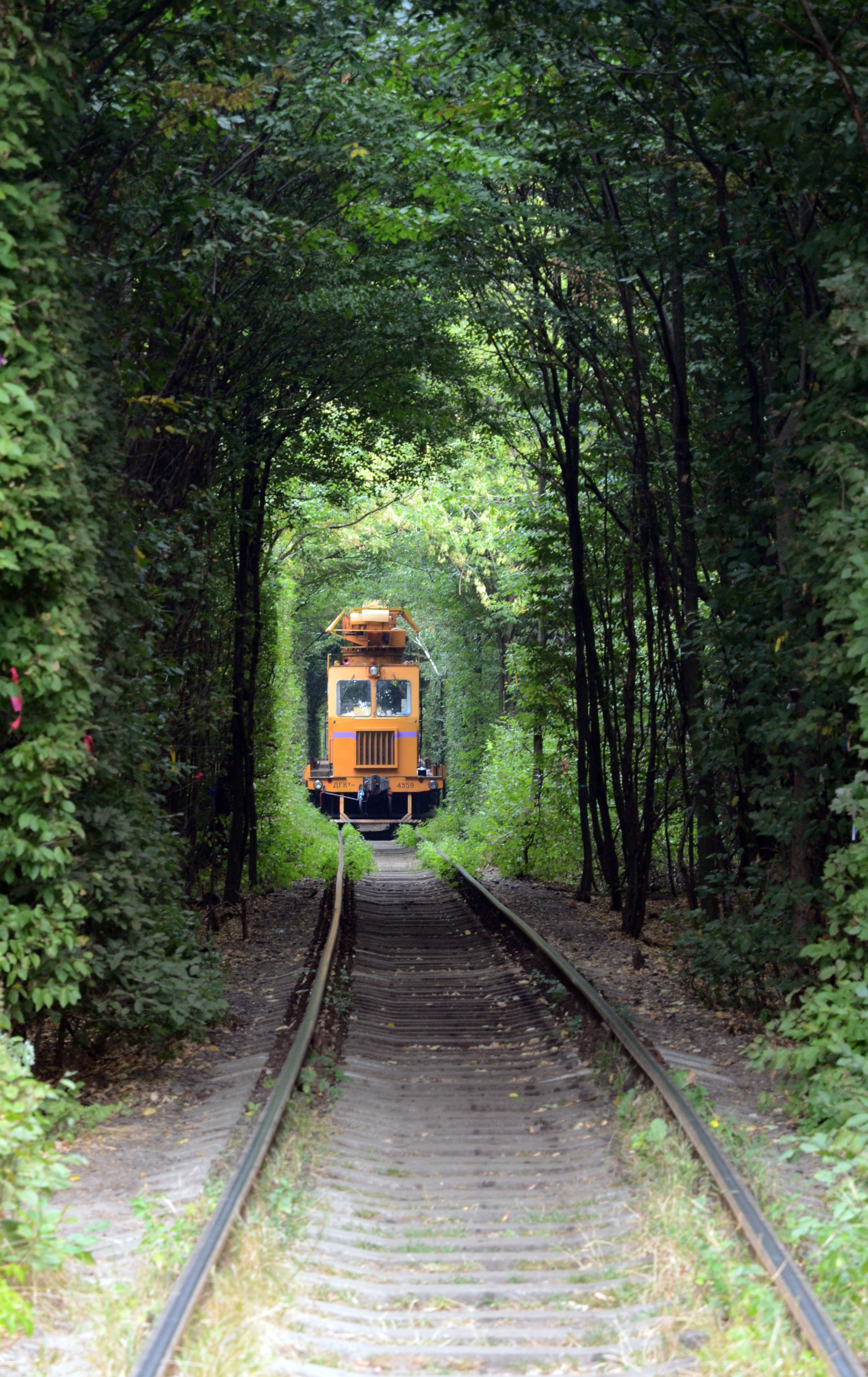 Туннель любви. Ровенская обл.